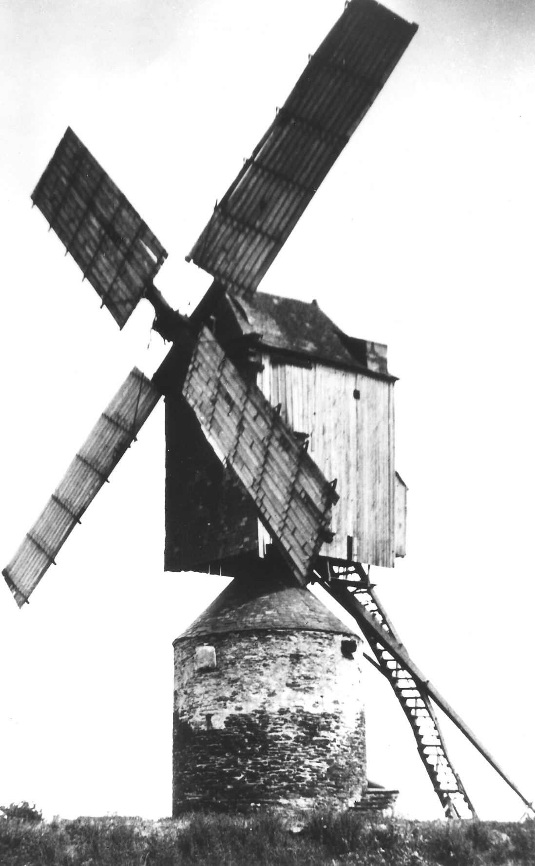 Moulin à vent de la Lande à la Pouëze en Maine et Loire.